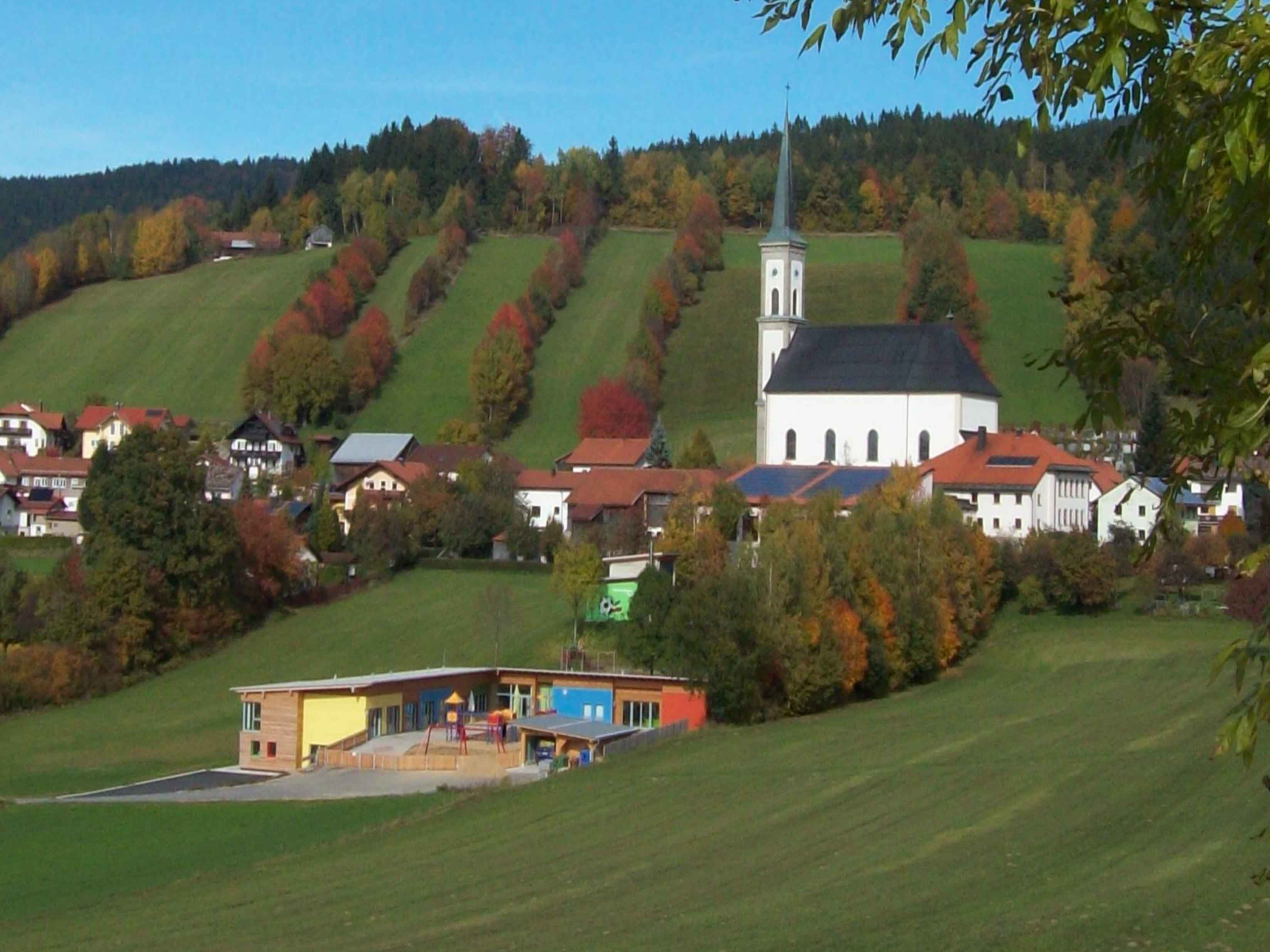 Grainet - Neuer Kindergarten (2012 eingeweiht)